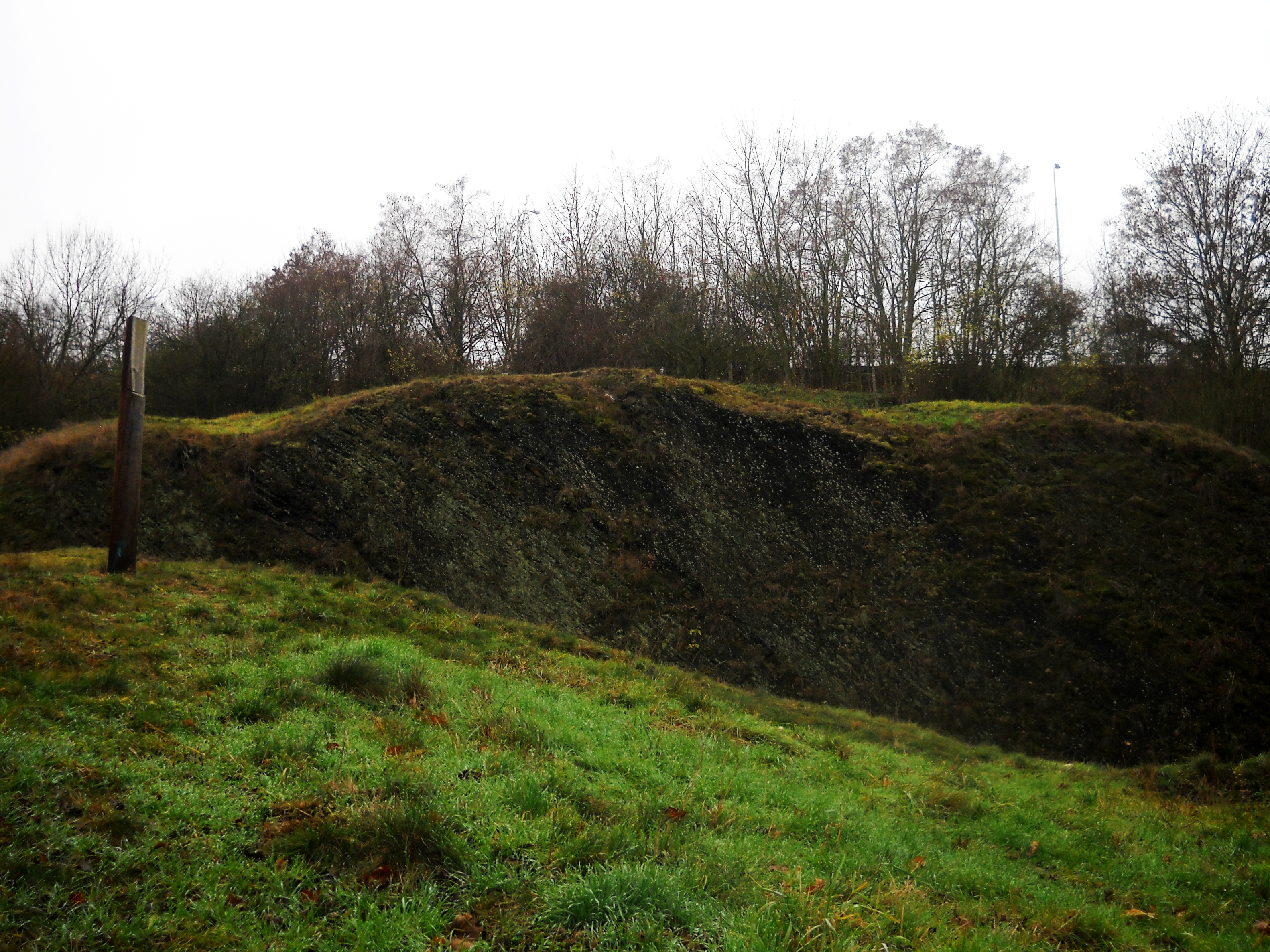 Praha-Hlubočepy, přírodní památka Železniční zářez. Skalní vrcholky s výskytem xerotermních trávníků